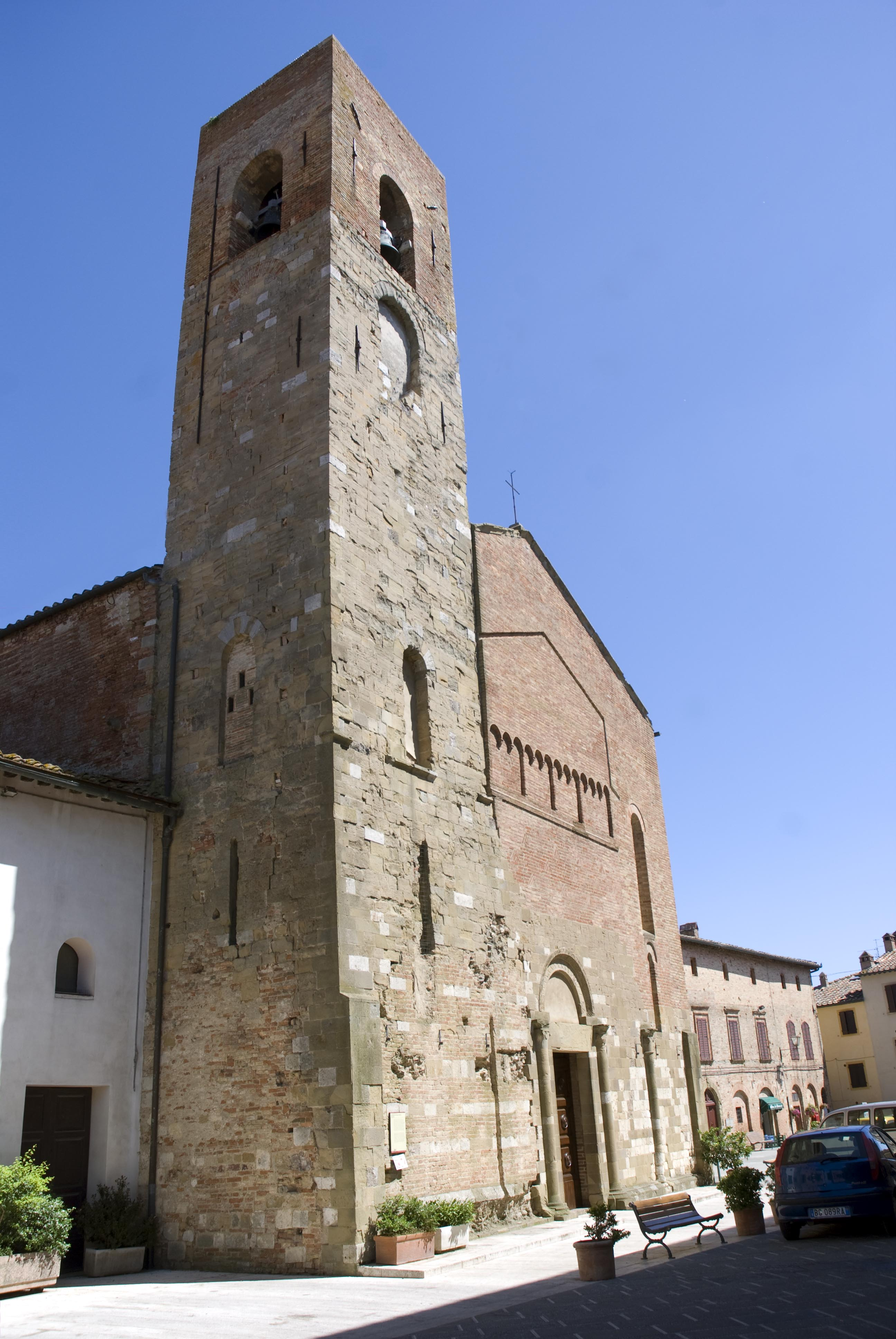 Facciata della chiesa principale di Casole d'Elsa